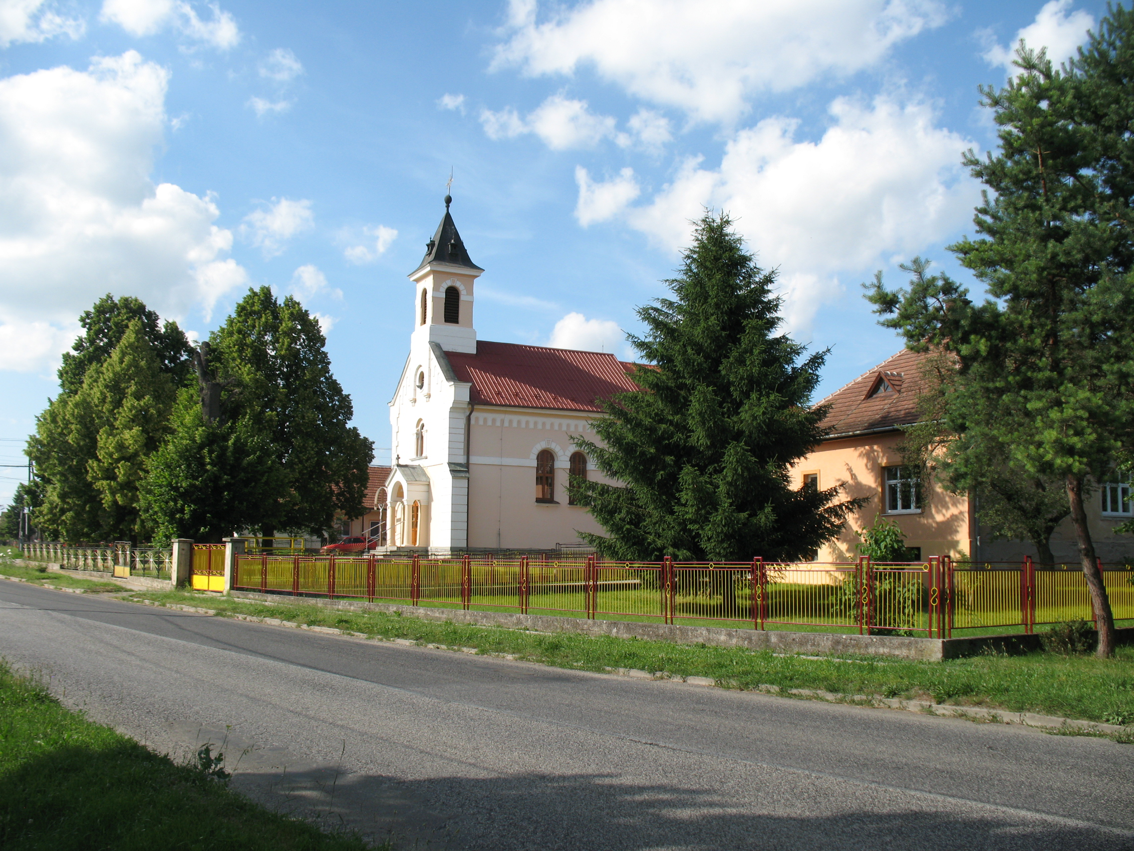 Alsóneszte